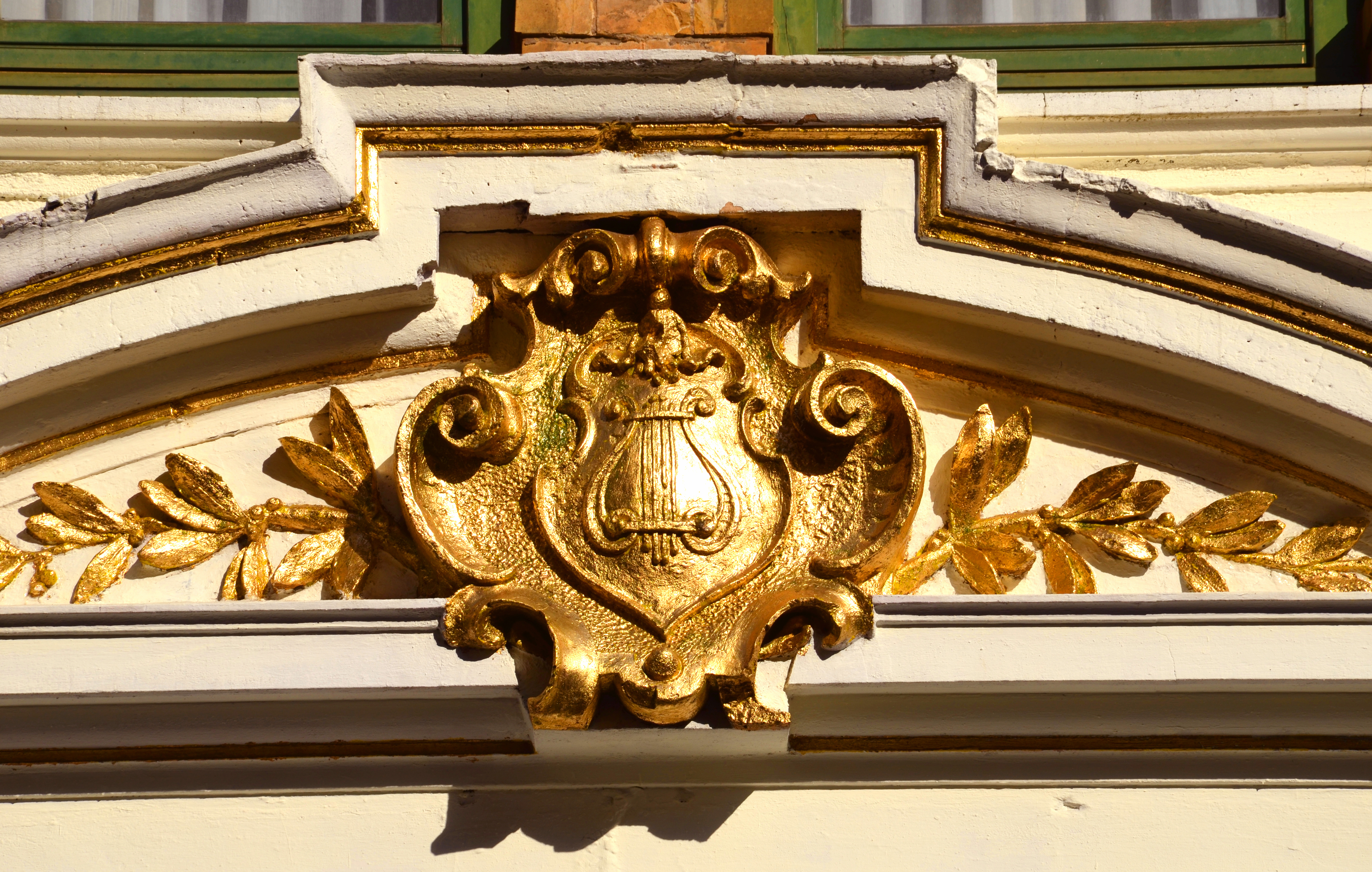 Von der Künstlerin Sonay Hardt, die den Secondhand- und Kunsthandwerkladen in der Oberstraße 8 in der Nordstadt von Hannover betreibt, nachträglich vergoldete Lyra über der Durchfahrt zum Hinterhof des Gebäudes ...